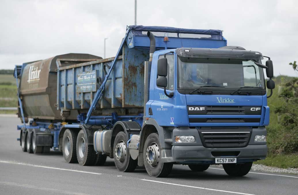 VIRIDOR-DAF